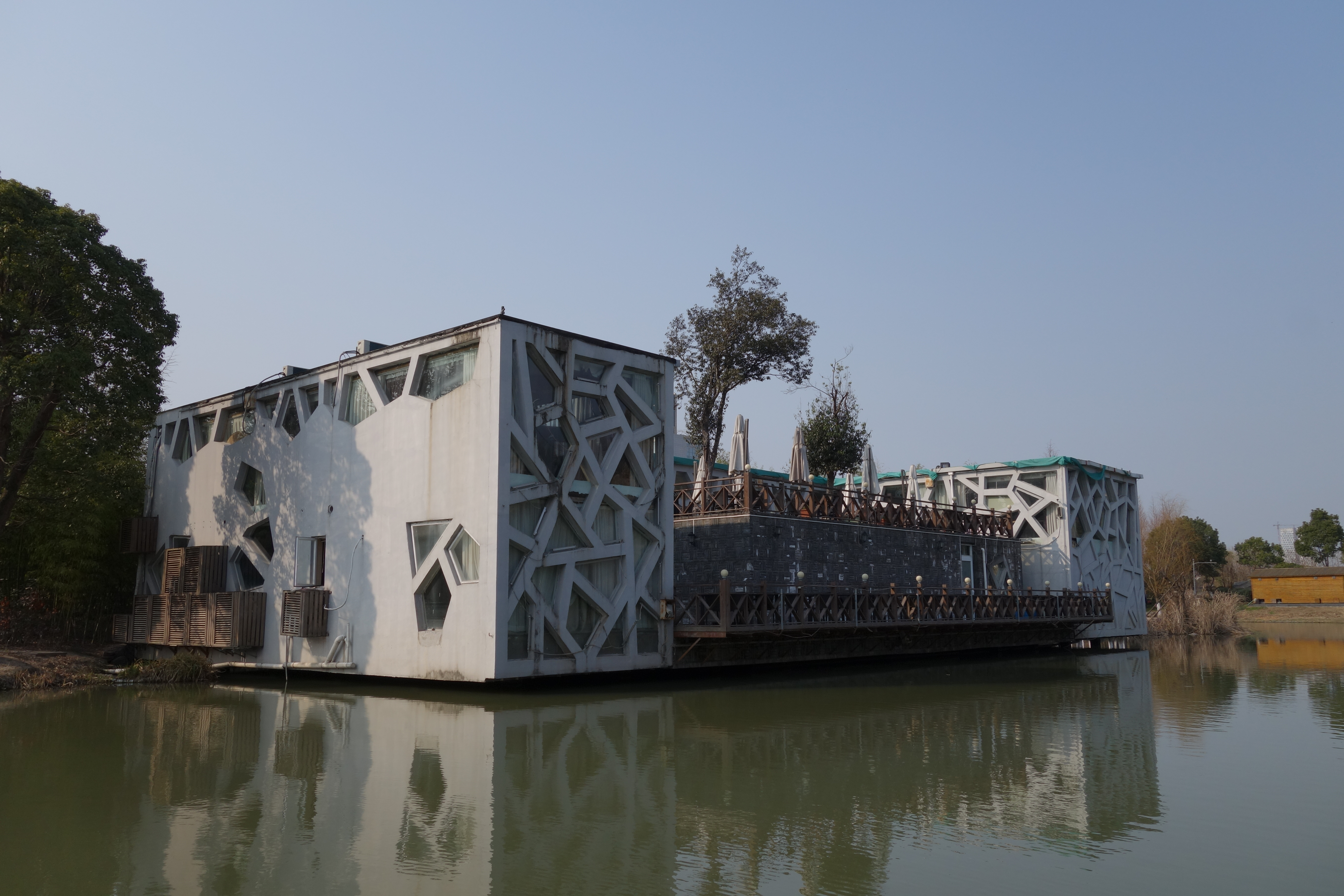 鄞州五散房 - 茶室1